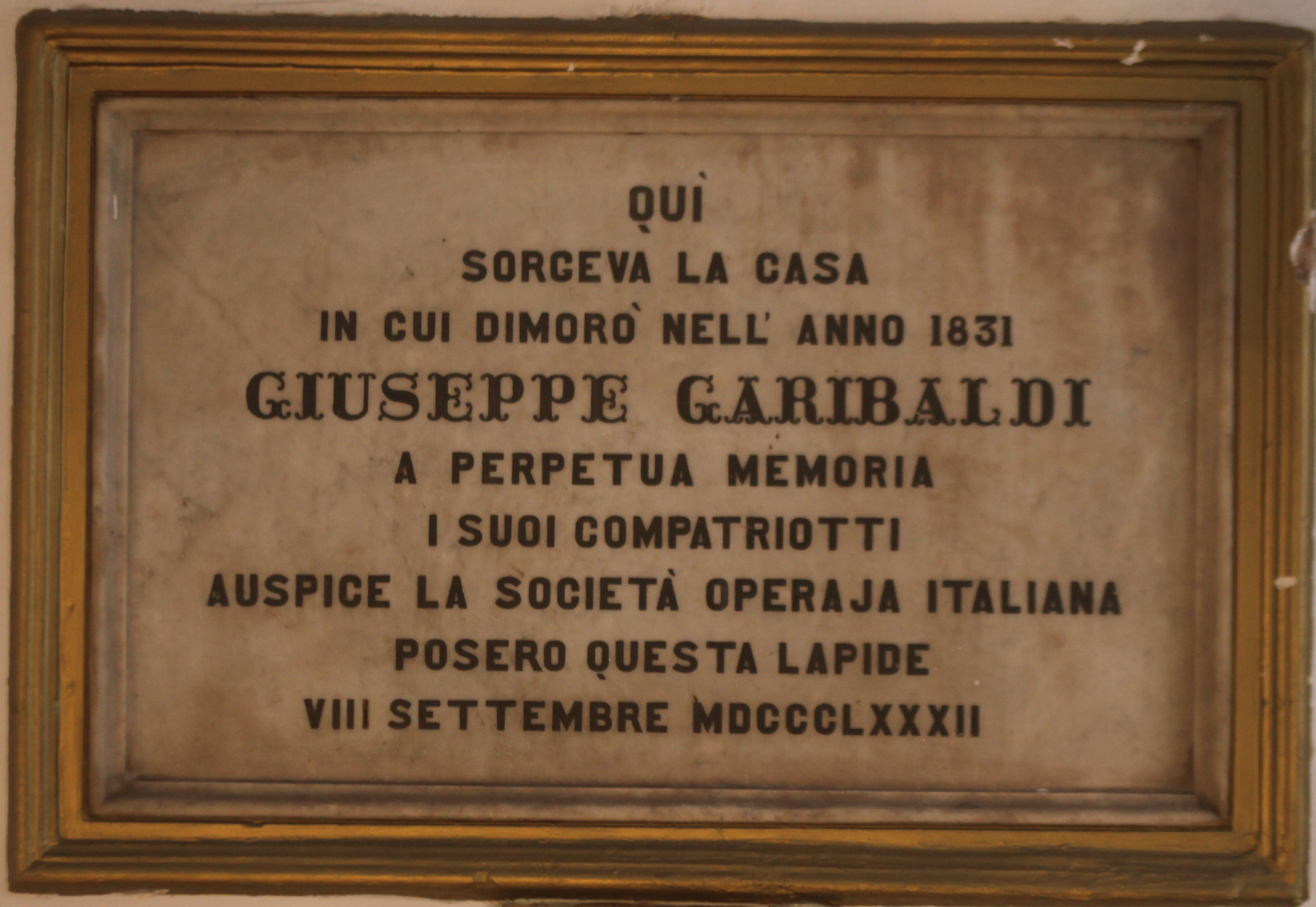 İstanbul'daki Garibaldi Evi levhası.